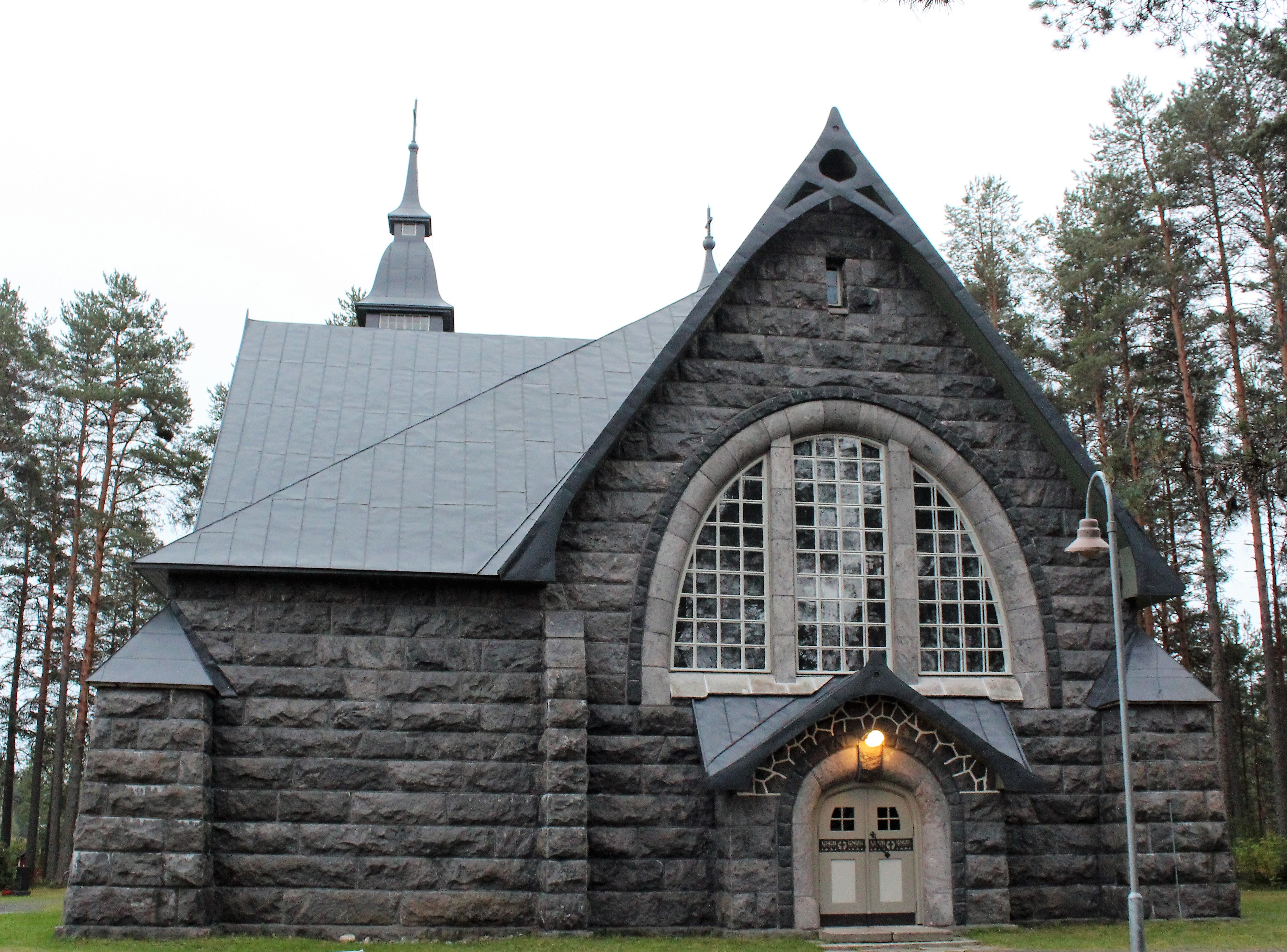 Varpaisjärven kirkko päädystä kuvattuna.